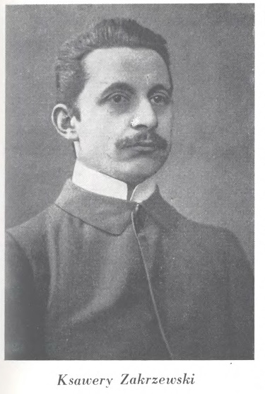 lekarz, społecznik, działacz niepodległościowy, twórca harcerstwa wielkopolskiego